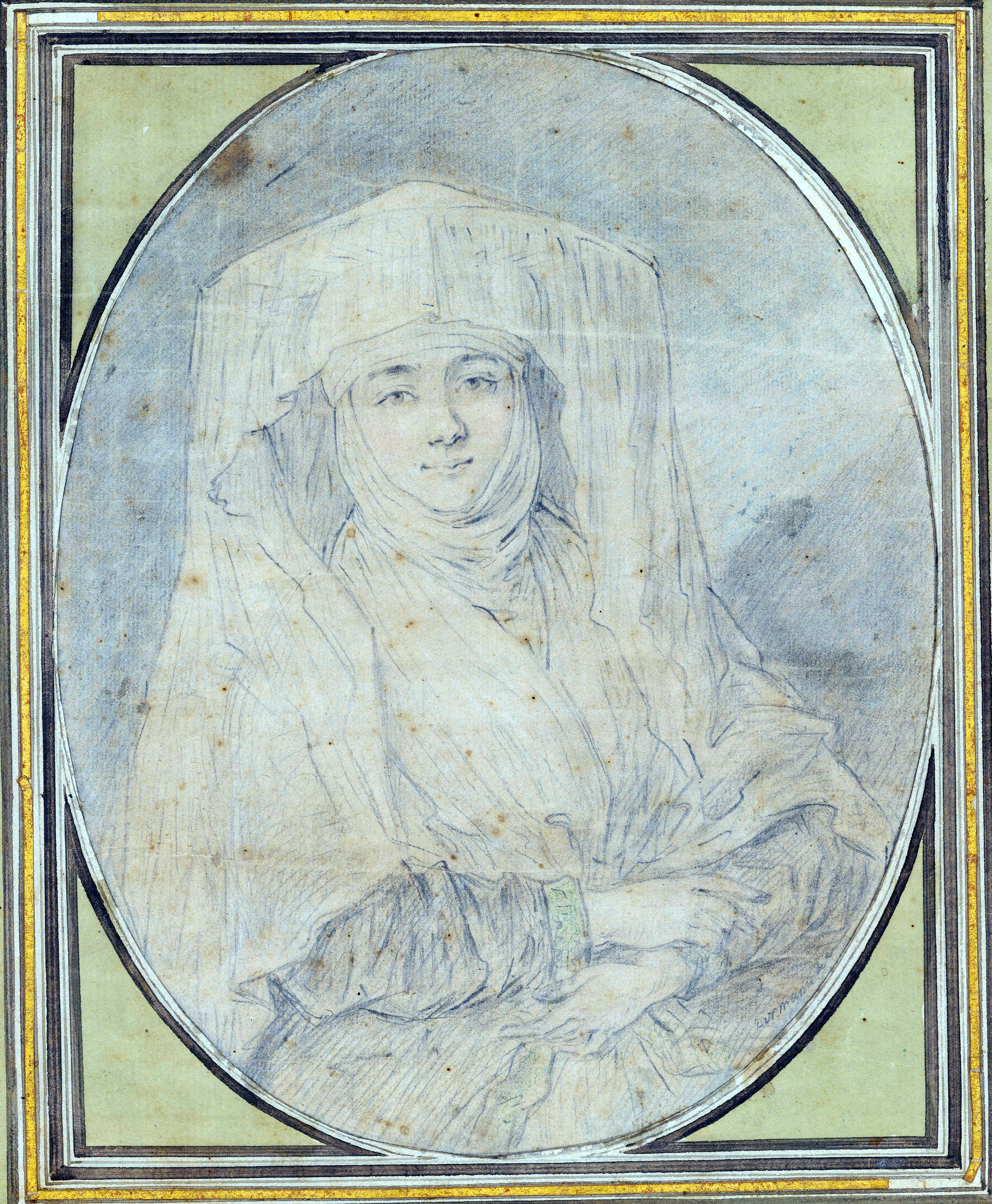 Portret młodej kobiety Antonina Wysockiego, ze zbiorów Biblioteki Jagiellońskiej, [1820-1850]